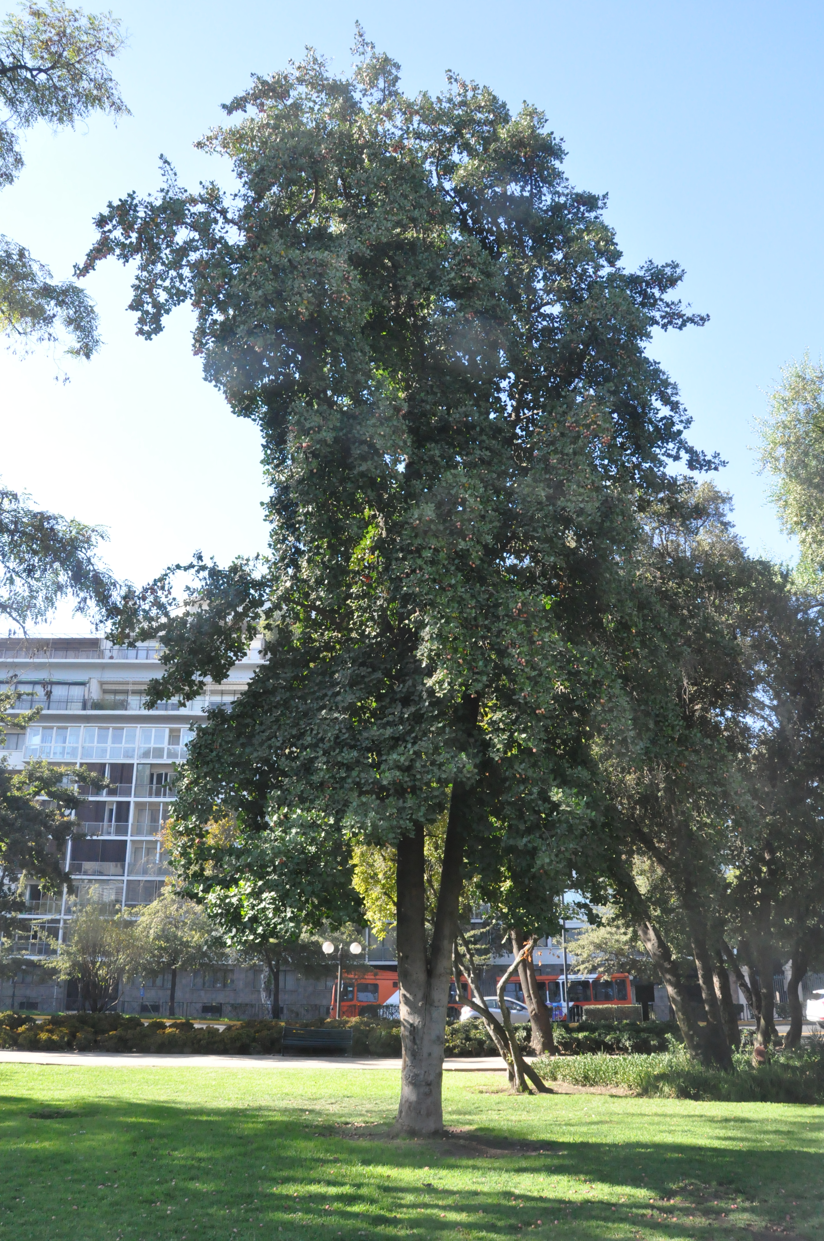 Belloto del sur (Beilschmiedia berteroana). Árbol nativo de Chile. Árbol en Parque Balmaceda